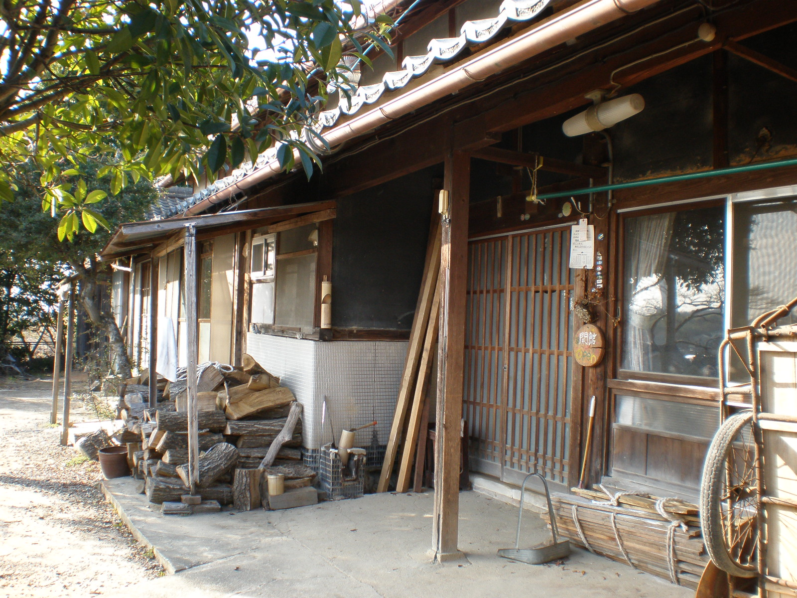 愛知県小牧市にある兒里の家